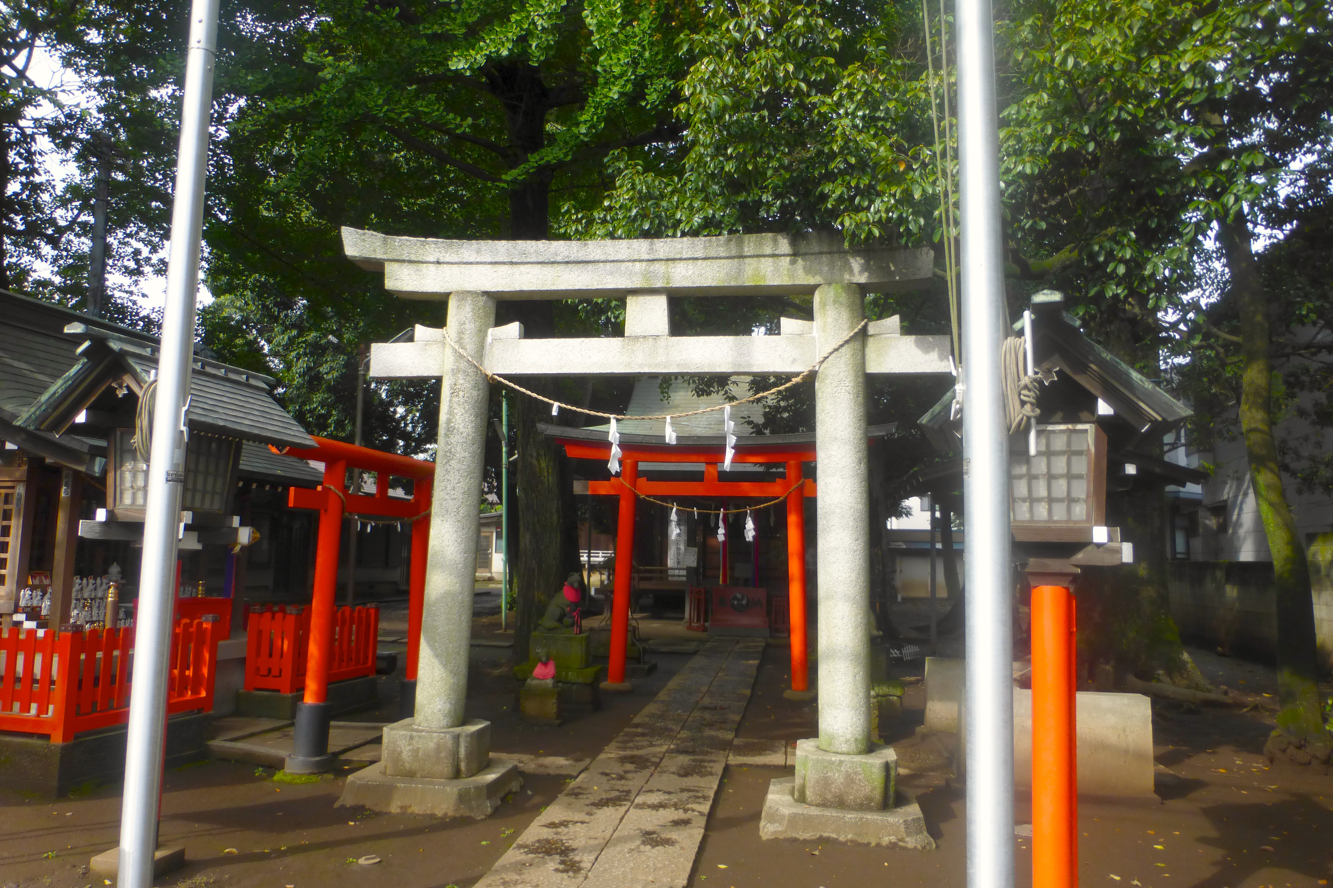 西高井戸松庵稲荷神社の鳥居